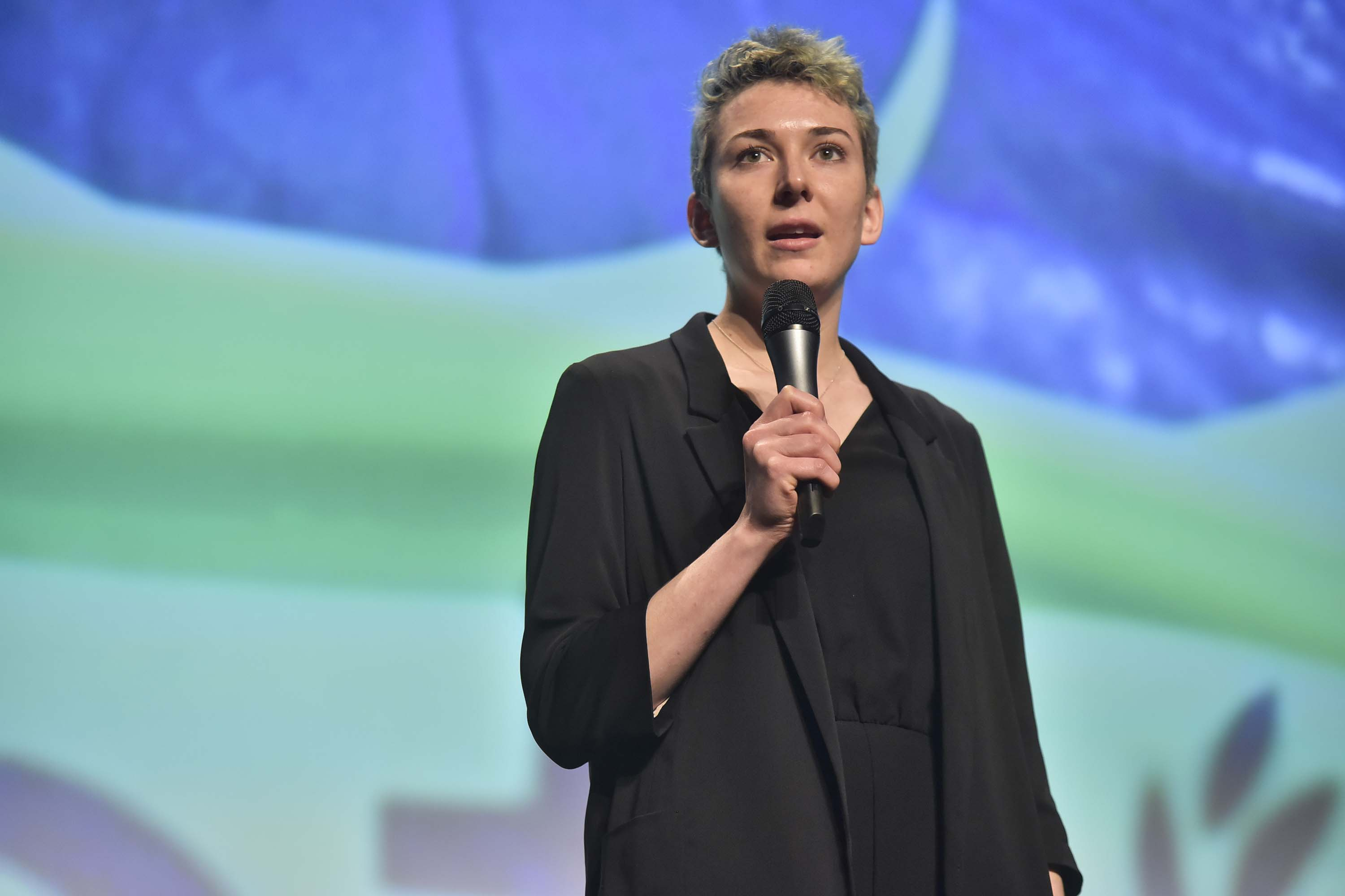 Film laburra / Cortometraje Victoria Eugenia Antzokia / Teatro Victoria Eugenia Argazkia / Fotografía: Iñigo Royo